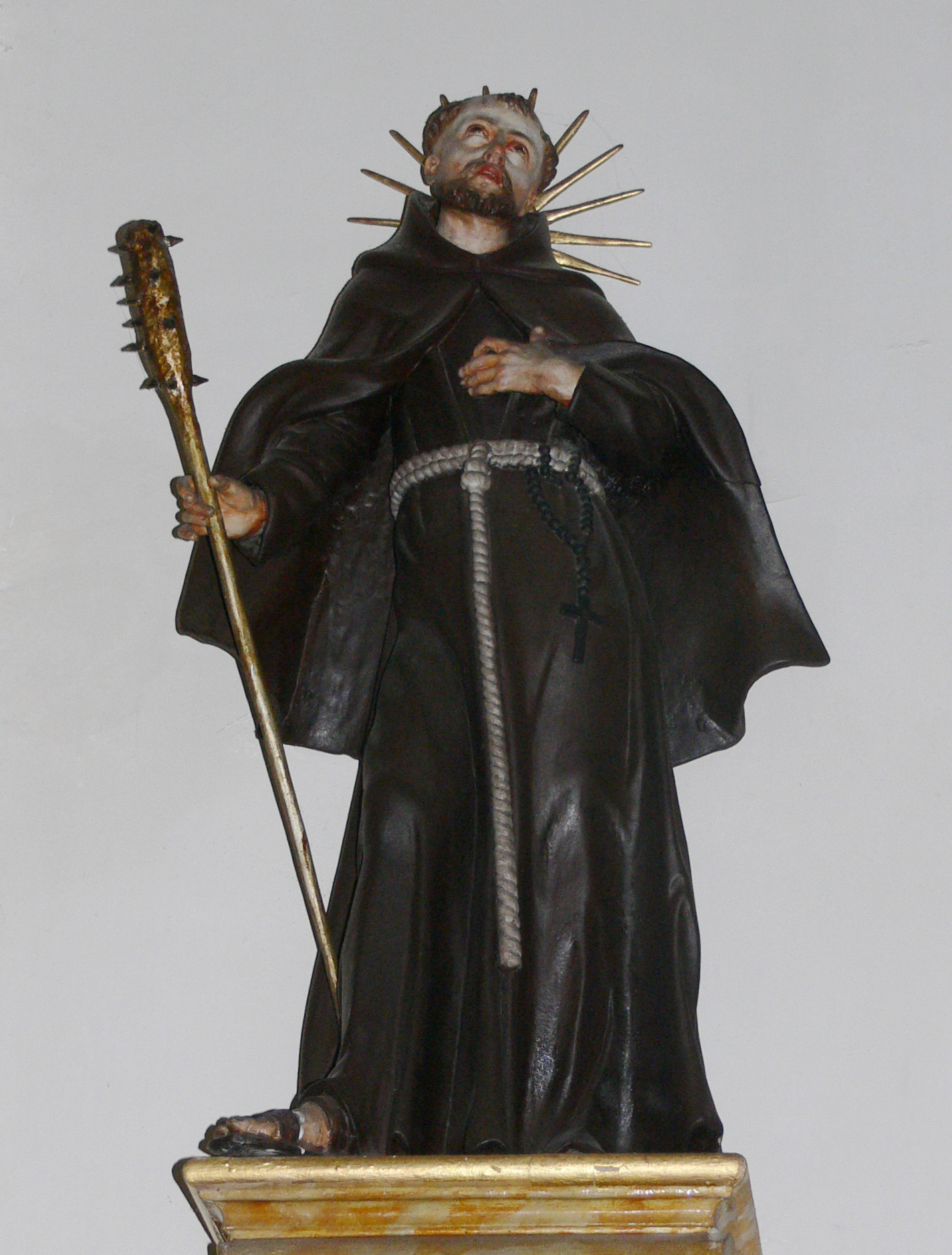 Kloster Habsthal, Gemeinde Ostrach, Landkreis Sigmaringen Pfarr- und Klosterkirche St. Stephanus, Figur „Hl. Fidelis von Sigmaringen“, 18. Jahrhundert